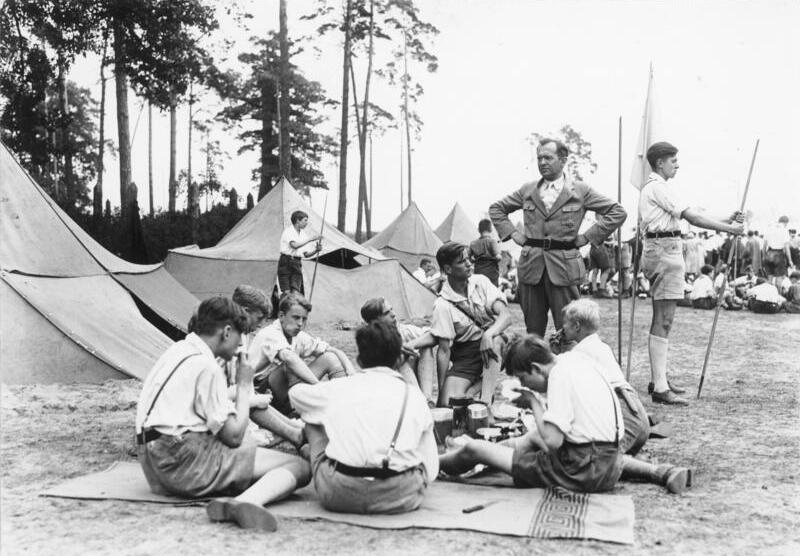 Blick in das Zeltlager der bündischen Jugend, welches den Außenstehenden einen Einblick in die Wesensart und die Formen bündischer Selbsterziehung geben soll. Information added by Wikimedia users.